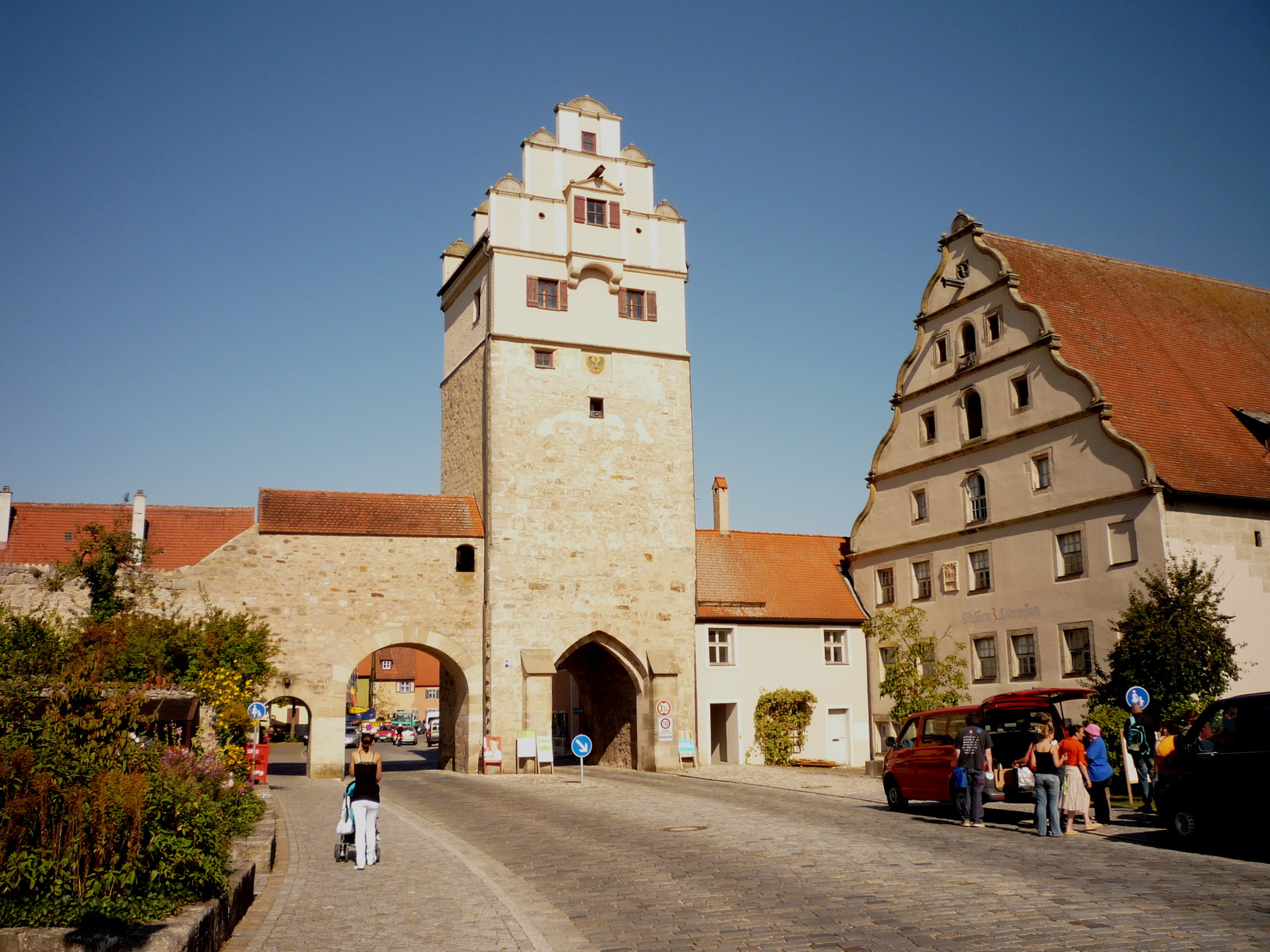 Nördlinger Tor - südliches Stadttor Dinkelsbühl in Mittelfranken